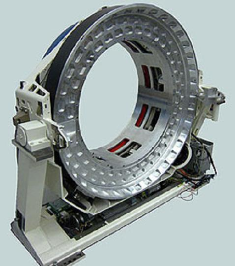 luftgelagerter Computer-Tomograph (mehrfach patentiert)